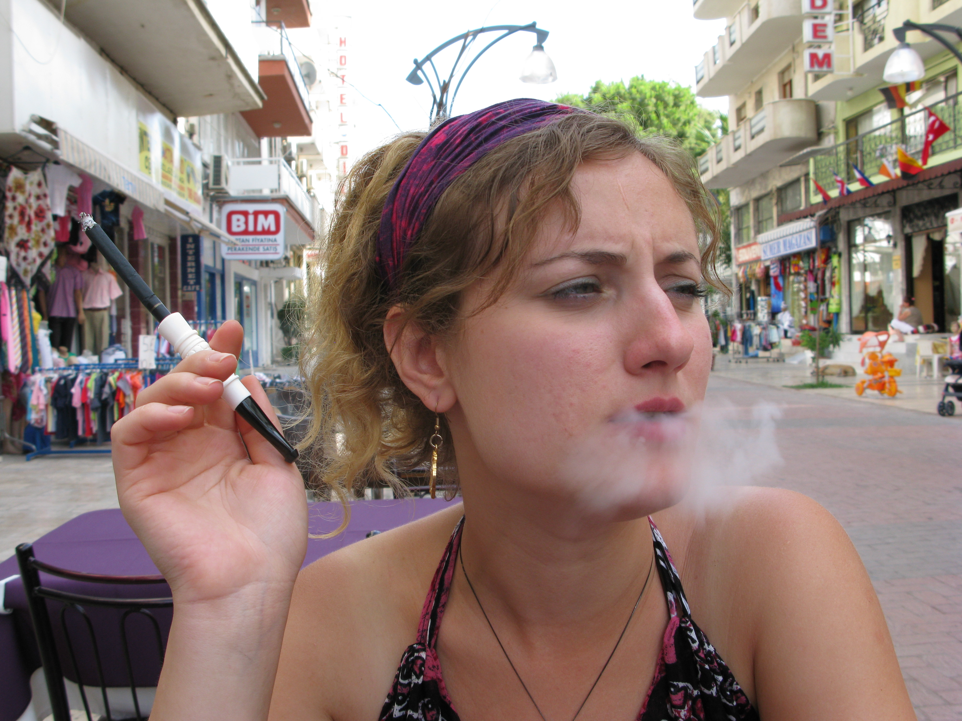 Kretek smoking